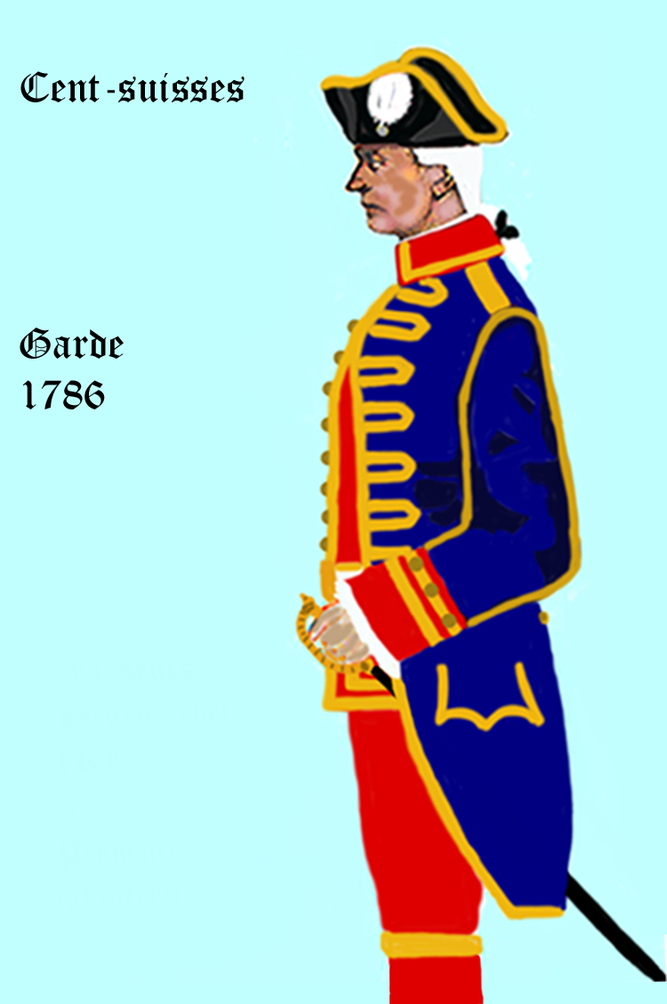 Uniform der Hundertschweizer (Hofdienst